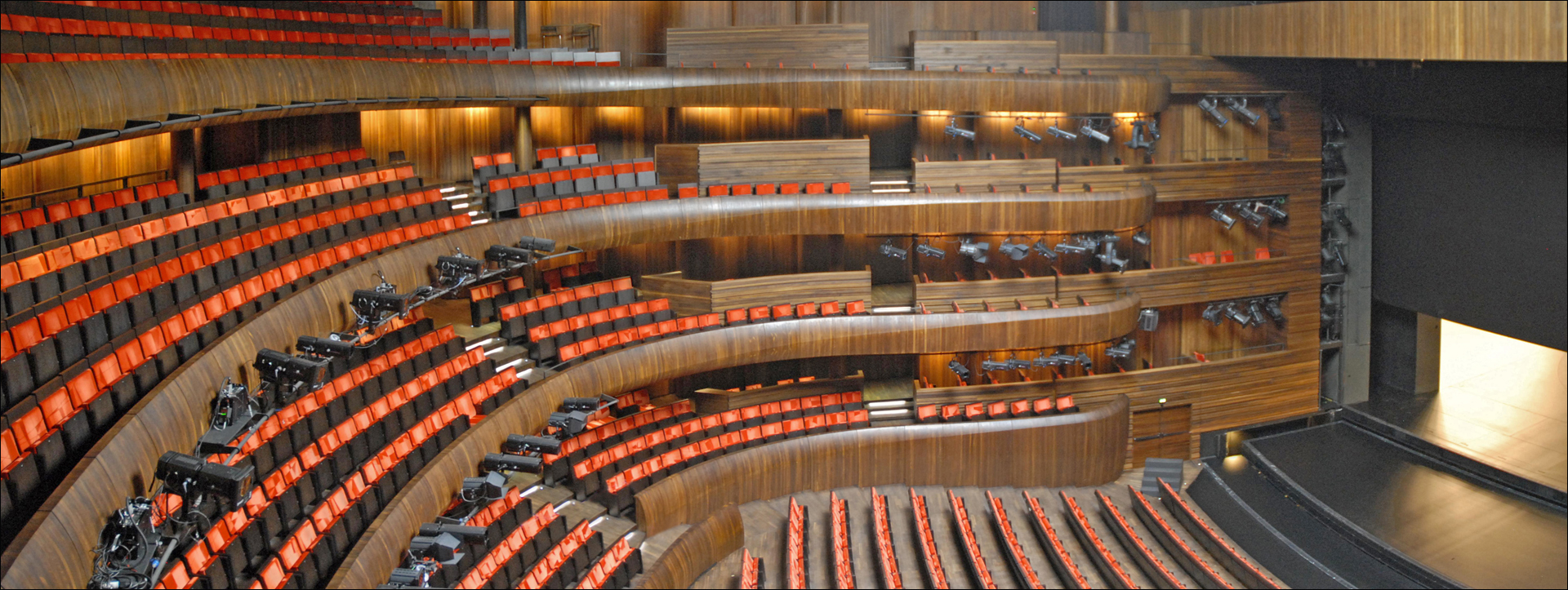 La grande salle dont le revêtement est en bois de chêne sombre comprend 1370 places. Son acoustique est la meilleure en Europe estiment les concepteurs. L'opéra national de Norvège à Oslo, conçu par l'agence Snøhetta (architectes Kjetil Trædal Thorsen, Tarald Lundevall et Craig Dykers) a reçu le prix européen d'architecture contemporaine 2009 snoarc.no/ L'édifice émerge du fjord au bord duquel il est construit tel un iceberg. Son toit blanc en marbre de Carrare, culminant à 32 mètres, est incliné afin d'y accueillir les promeneurs. A l'intérieur, trois salles de 1350, 400 et 200 places. Une grande partie des 38500 mètres carrés du bâtiment étant située sous le niveau de la mer, sa construction a nécessité la pose de 12000 m2 de palplanches. Il repose sur 28 kilomètres de piliers dont certains à moins 60 mètres. Les travaux ont duré cinq ans et coûté 525 millions d'euros. extrait du site